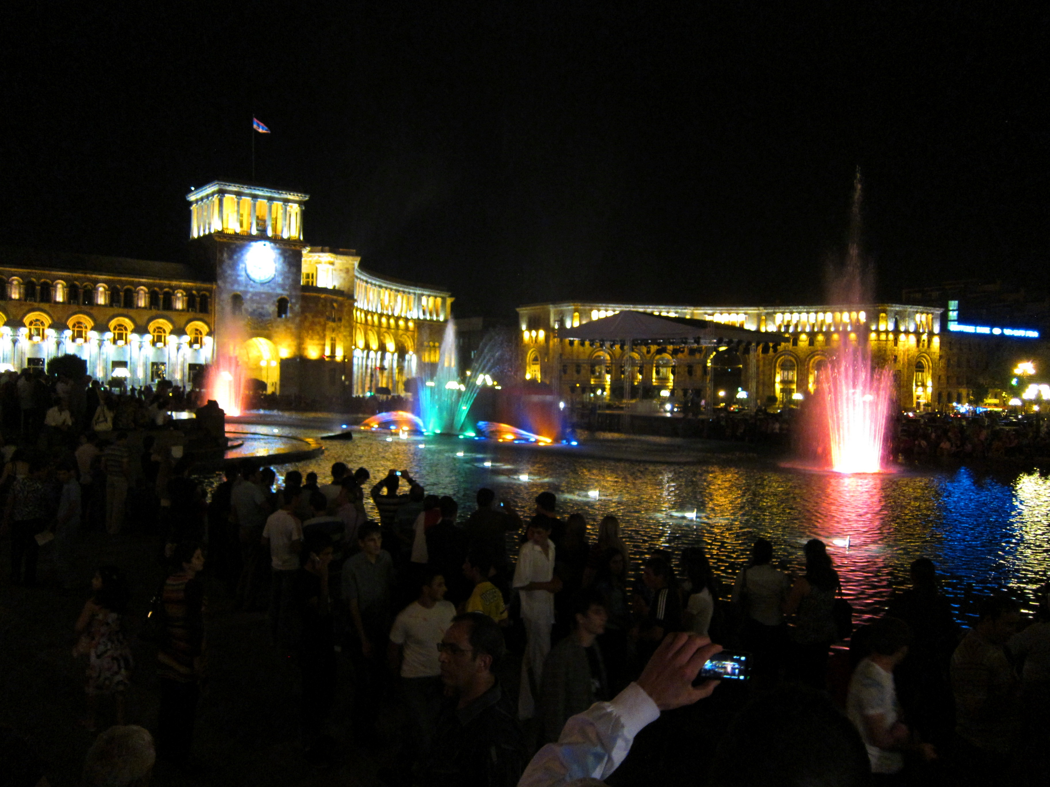 Yerevan at Night